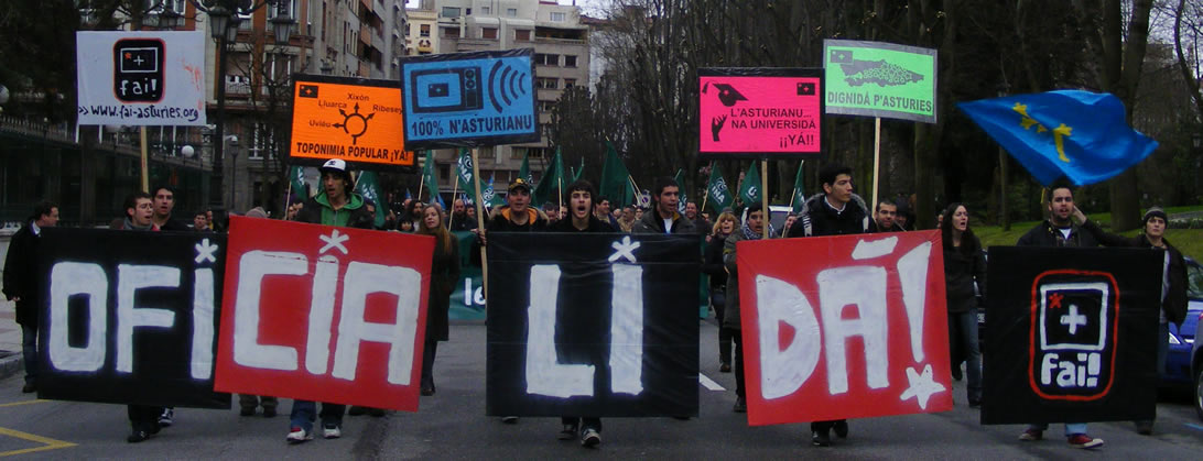 Mani pola oficialidá